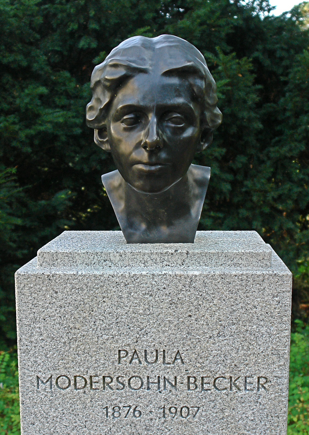 Denkmal Paula Modersohn-Becker - Bremen, Wallanlagen. Bronzeabguss der Büste, die die Bildhauerin Clara Westhoff 1899 schuf. Material: Bronze, Steinsockel. Errichtet: 2007 zum 100. Todestag von Paula Modersohn-Becker. Kunst im öffentlichen Raum – ein Bremer Programm k: kunst im öffentlichen raum bremen